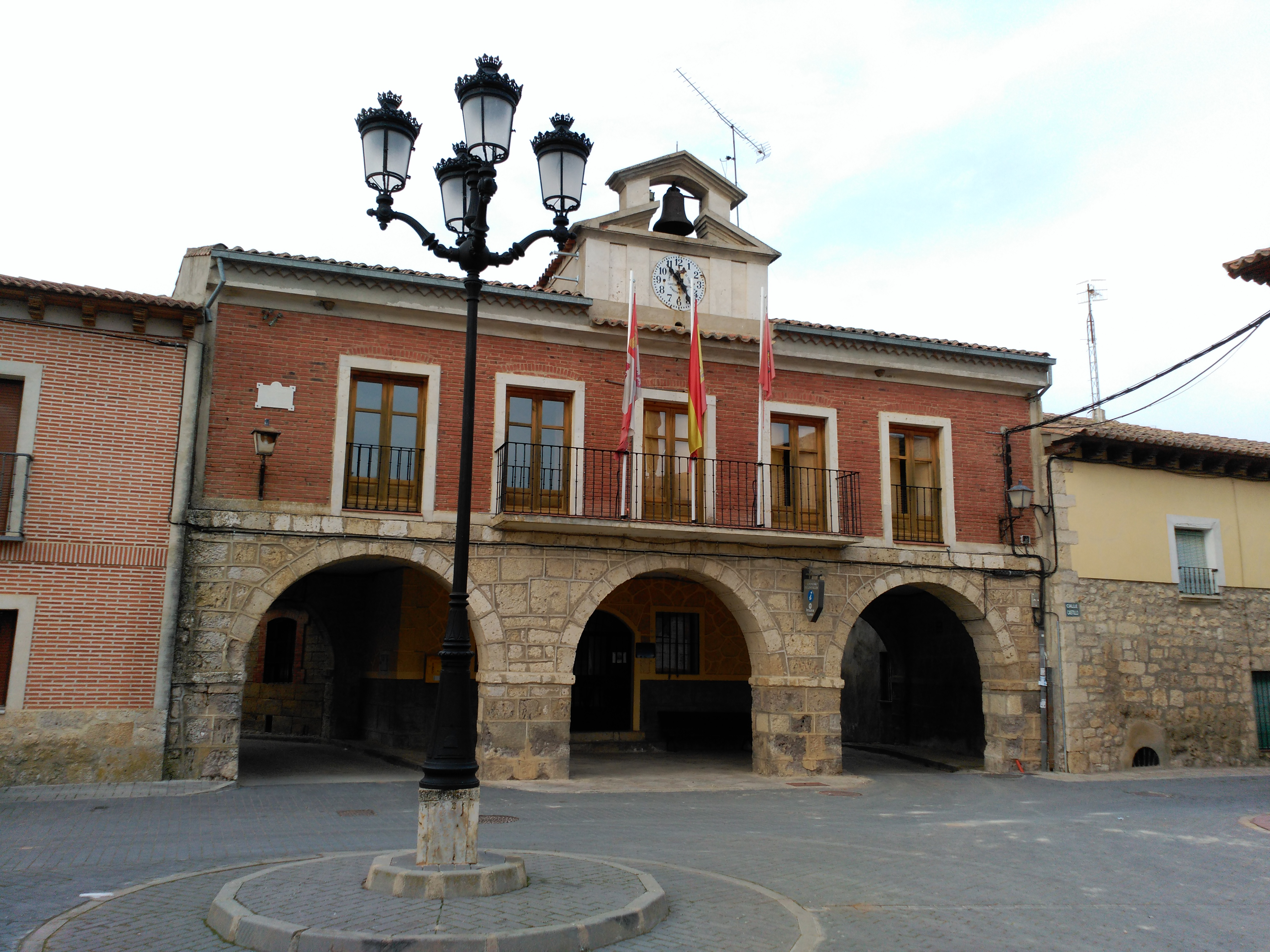 Casa consistorial de Valdenebro de los Valles (Valladolid).